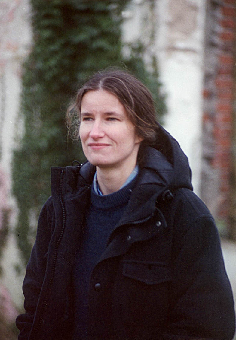 Nederlands schrijver